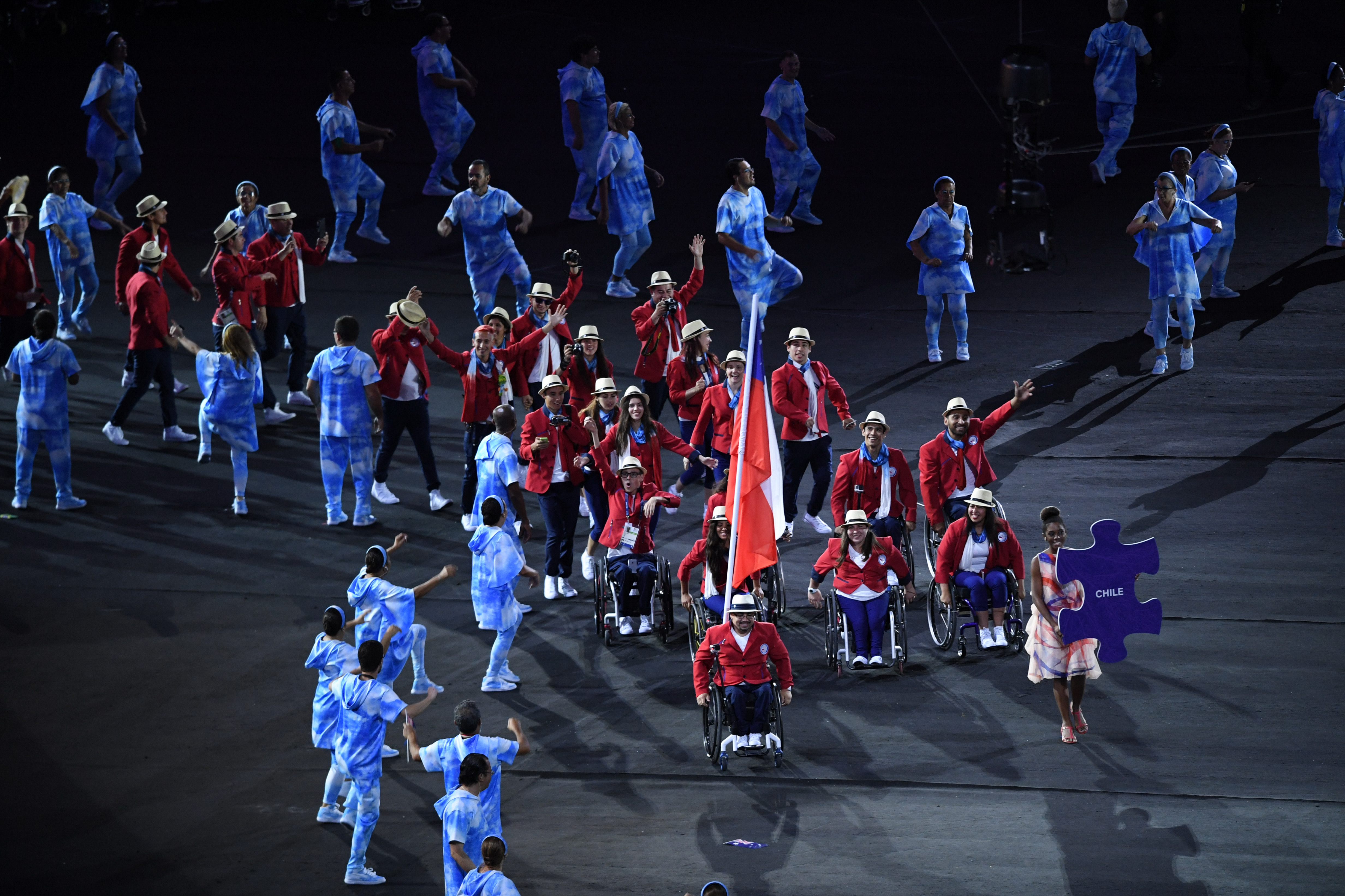 Rio de Janeiro - Cerimônia de abertura dos Jogos Paralímpicos Rio 2016 no Estádio do Maracanã